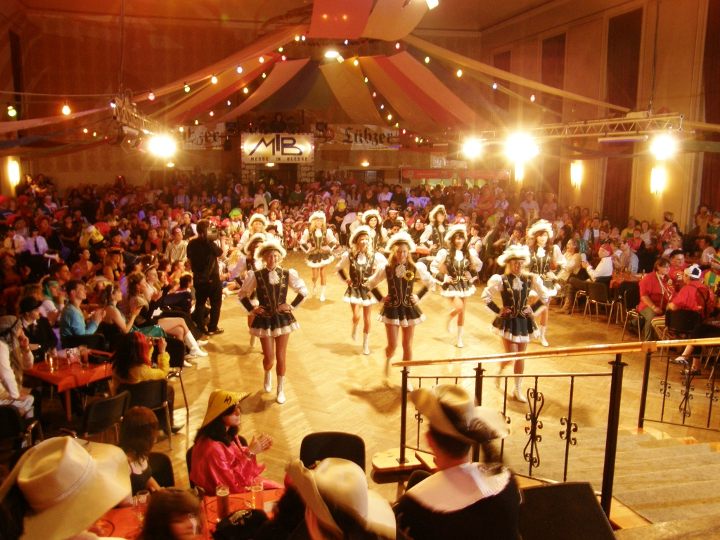 Kulturhaus Plessa (culture house Plessa, last event before detent, 2008)